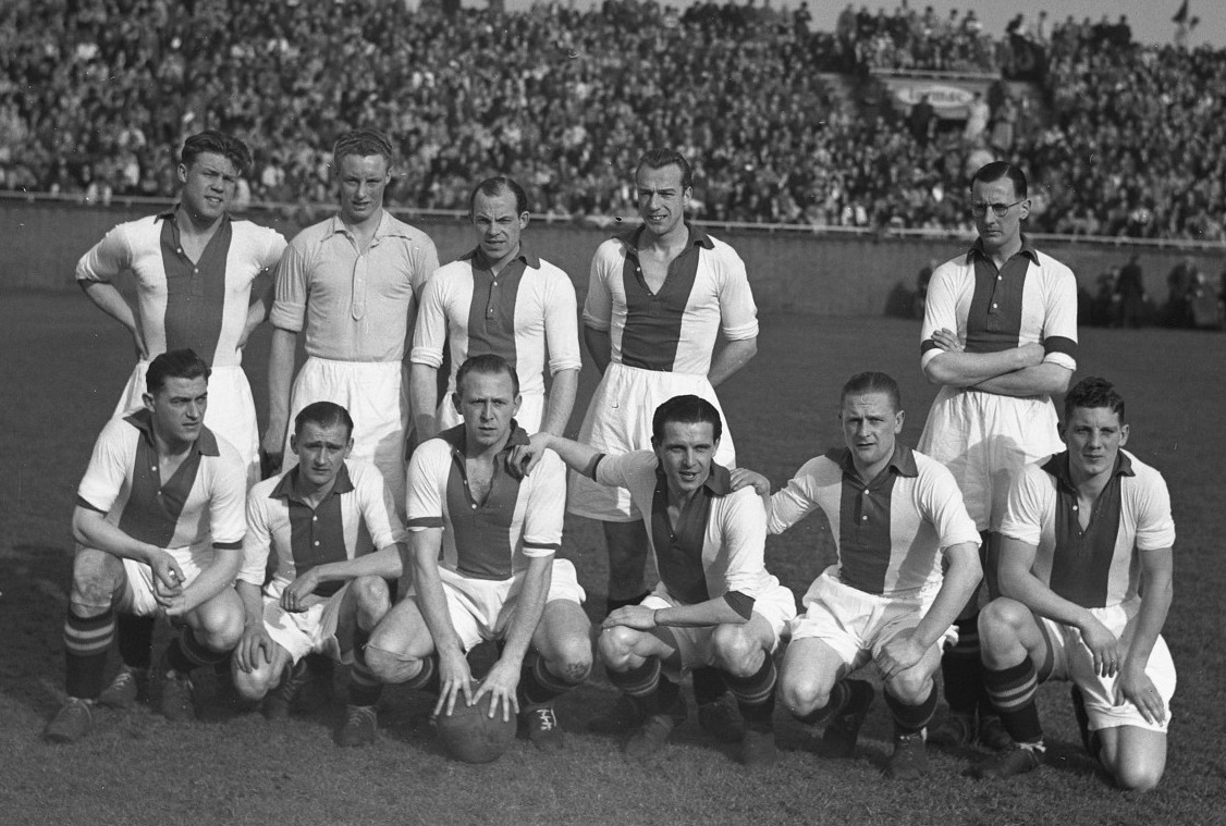 Ajax tegen DWS. Ajax elftal.Staand vlnr: Rinus Michels, Ad van de Pol, Cor van der Hoeven, Ger Beumer, Joop Stoffelen; zittend vlnr: Jan Potharst, Jan Los, Gerard Bruins, Guus Dräger, Gé van Dijk, Cor van der Hart.